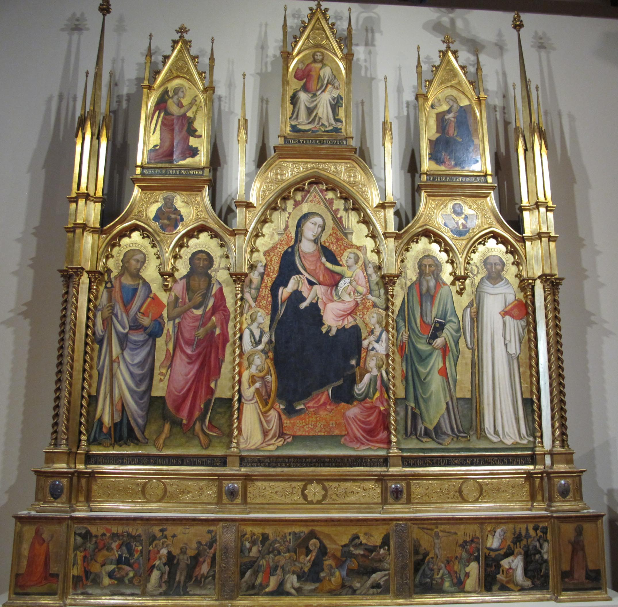 Mariotto di nardo, polittico serristori, 1424